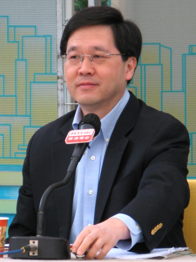 Stephen Lam Sui Lung 林瑞麟